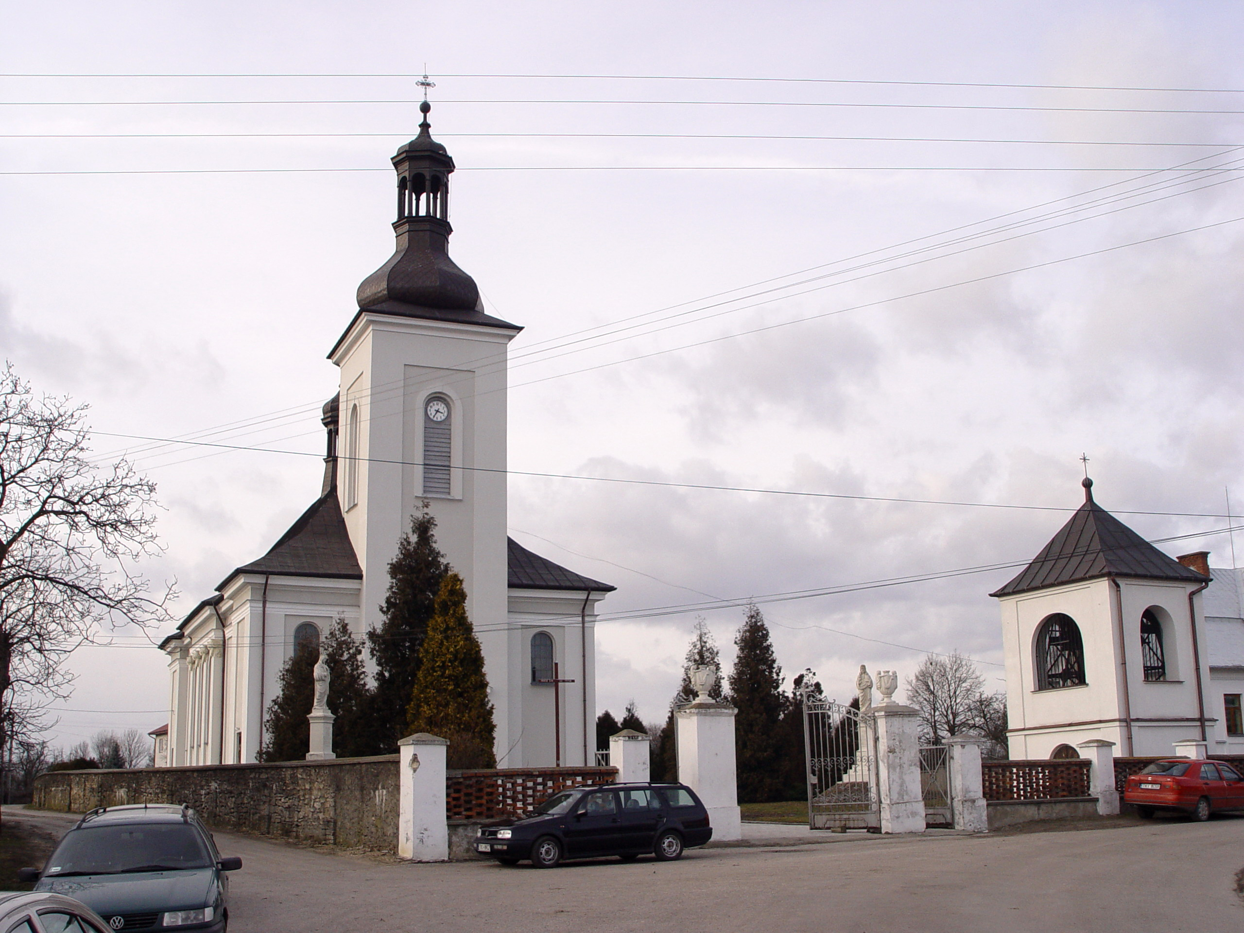 Balice, Kościół Św. Stanisława b. m. (WikiMapia